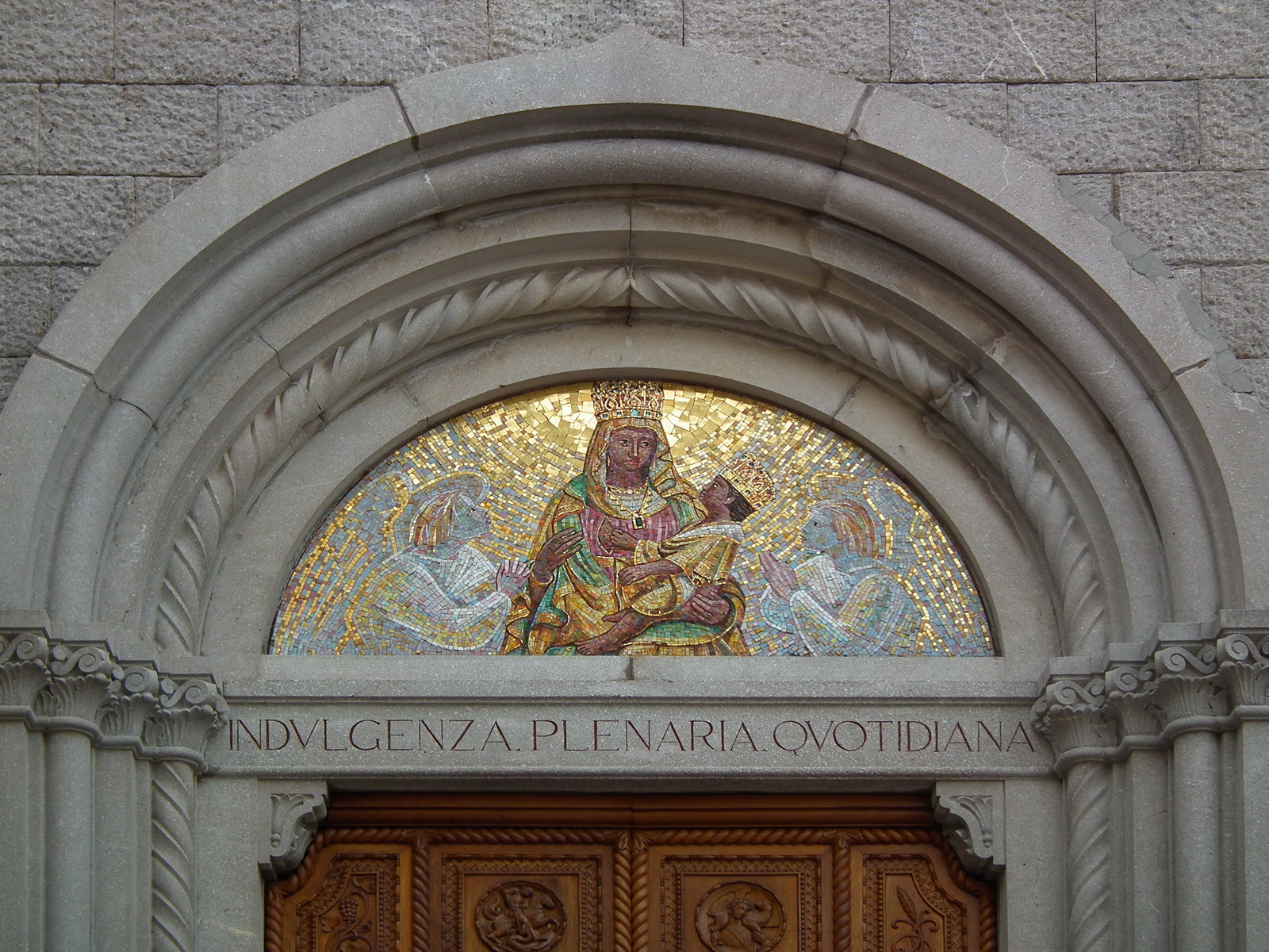 Santuario della Beata Vergine di Castelmonte Native nameSantuario della Beata Vergine di CastelmonteLocationPrepotto, Udine, ItalyCoordinates46° 05′ 38.46″ N, 13° 31′ 13.8″ E Established1469 - 1479 (Constructed)Website